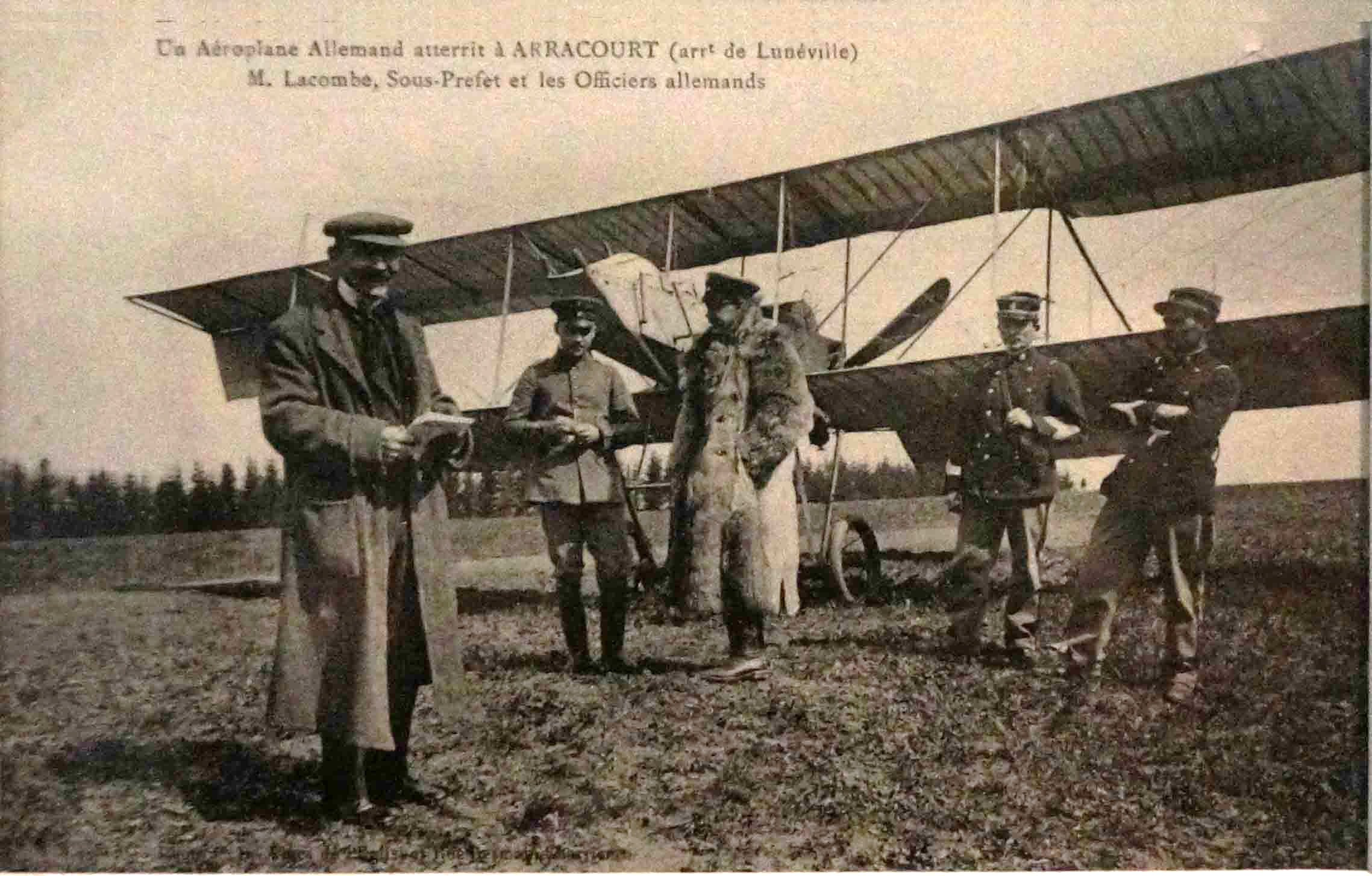 Présenté lors de Été 1914 Nancy et la Lorraine dans la guerre exposition.